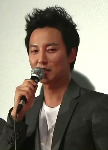 해적 - 강력 추천 영상